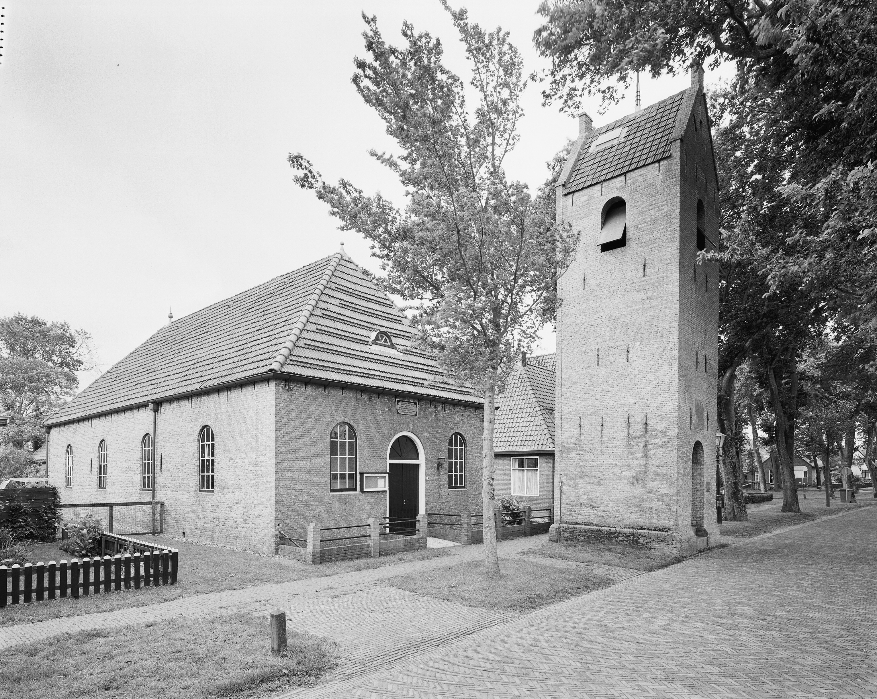 Nederlands Hervormde Kerk: Overzicht noordwestgevel met vrijstaande klokkentoren (opmerking: Gefotografeerd voor Monumenten In Nederland Friesland, bladzijde 78)